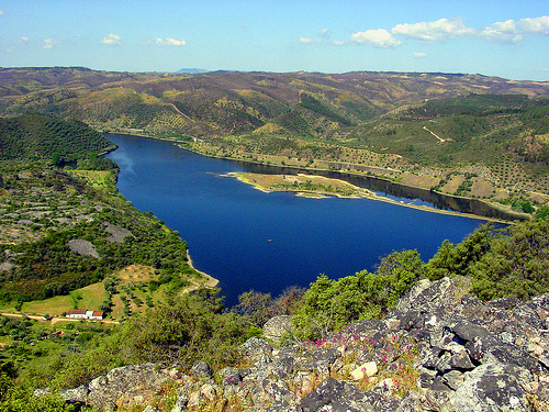 El río Tajo en Portugal.